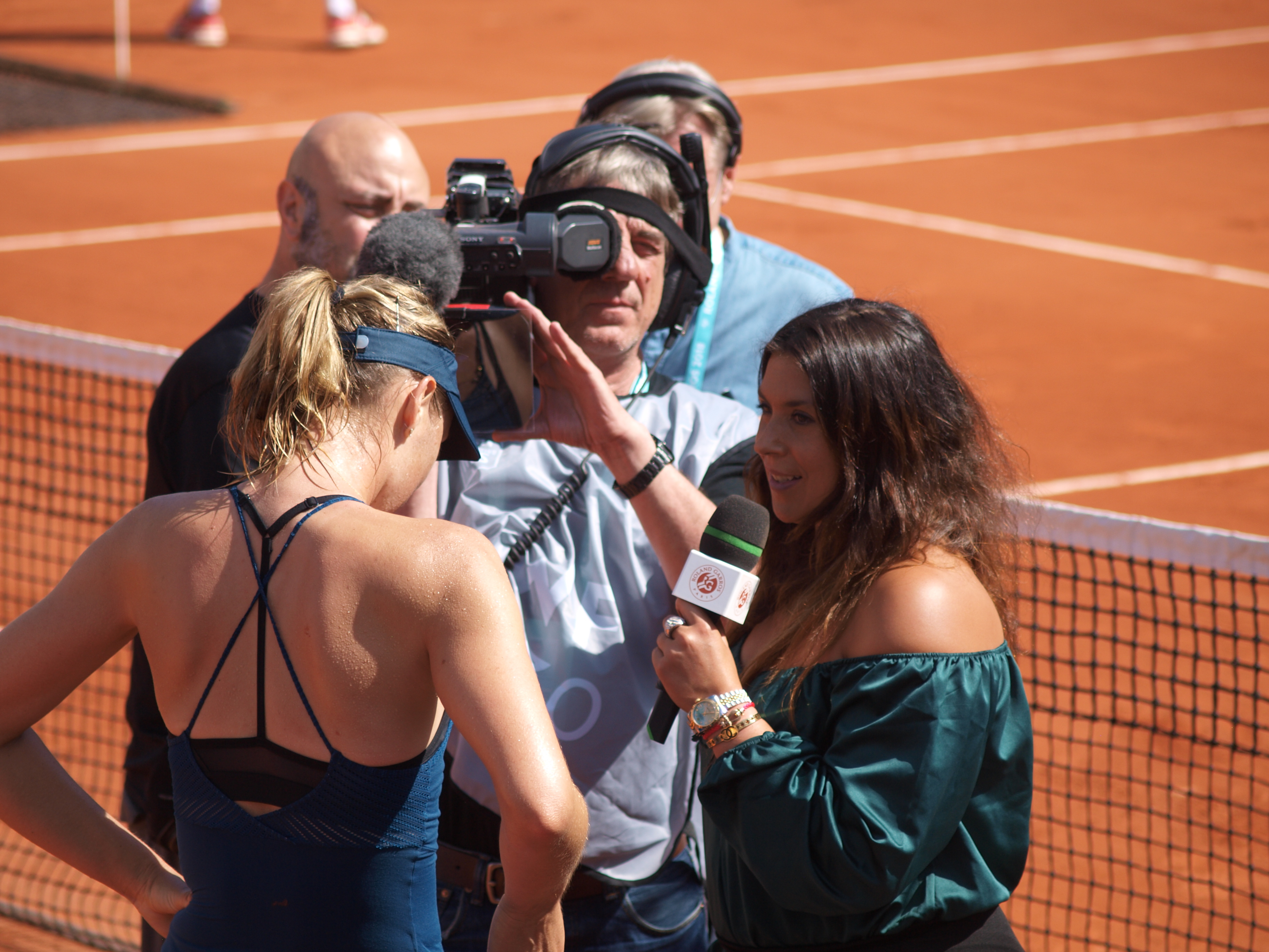 Caméramans, sur le court Lenglen (stade Roland Garros à Paris), le 29 mai 2018